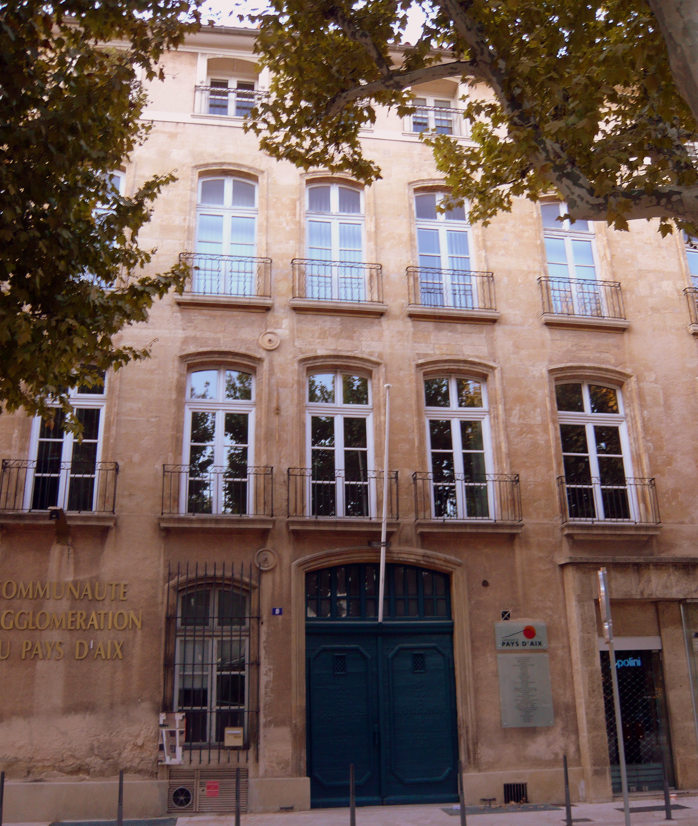 Hôtel de Boades, 8 place Jeanne-d'Arc, Aix-en-Provence (France). Ancien commissariat de police. .